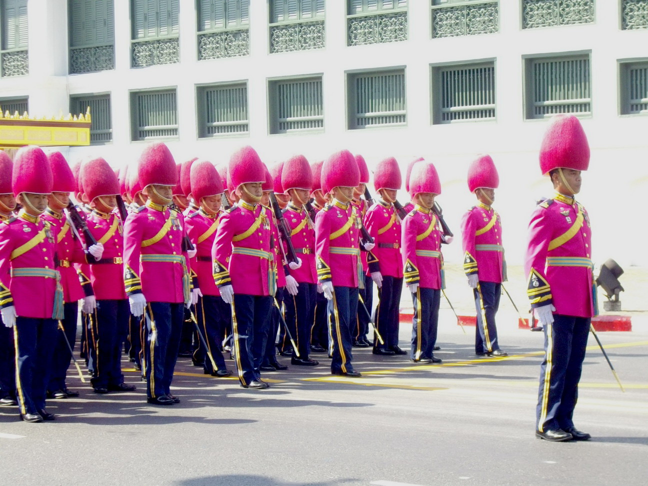 แถวทหารรักษาพระองค์จากกองพันทหารอากาศโยธินที่ 1 รักษาพระองค์ ในริ้วกระบวนเชิญพระศพสมเด็จพระเจ้าพี่นางเธอ เจ้าฟ้ากัลยานิวัฒนา กรมหลวงนราธิวาสราชนครินทร์ ริ้วกระบวนที่ 2 หน้าพระที่นั่งสุทไธสวรรยปราสาท ถนนสนามไชย วันที่ 15 พฤศจิกายน พ.ศ. 2551